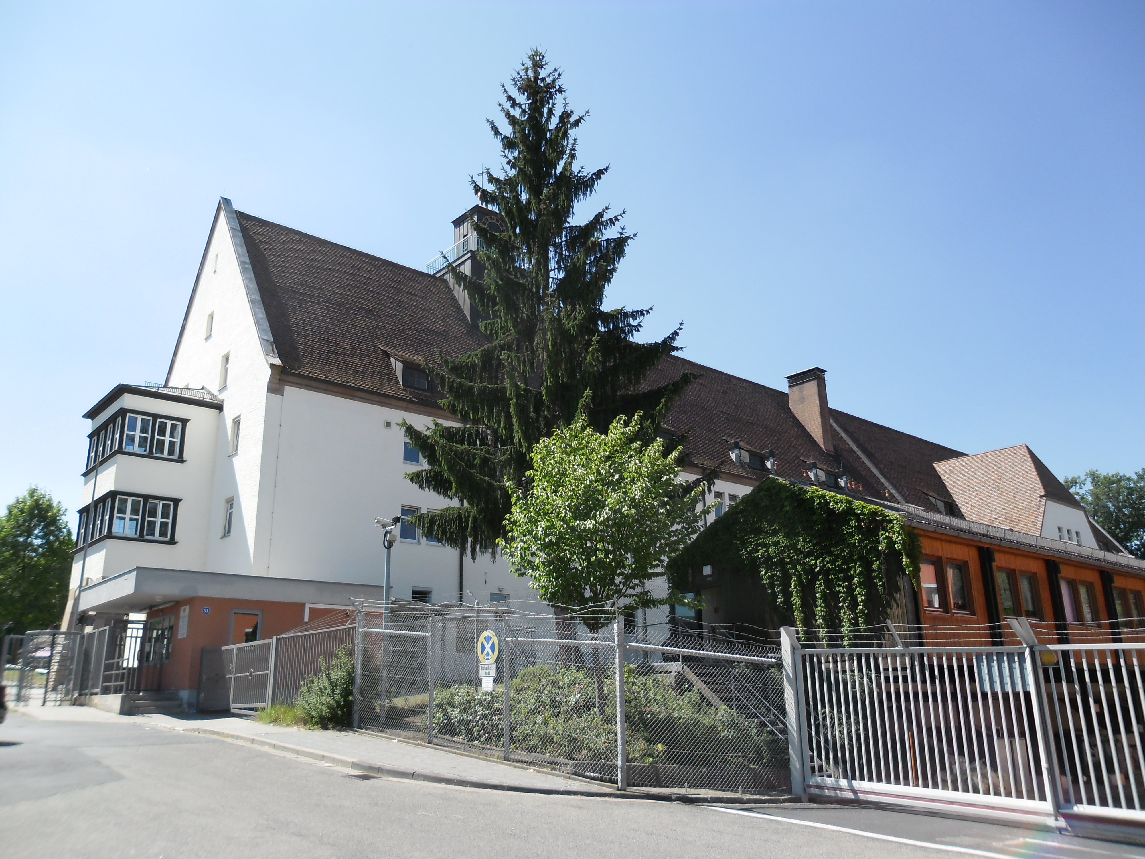 Außenansicht des Gebäudes Rothenburger Straße 31 der Zentralen Aufnahmeeinrichtung für Asylbewerber (ZAE) Zirndorf vom Haupteingang gesehen